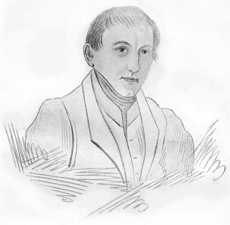 Дмитрий Петрович Таптиков (Таптыков?), осужденный в 1827 году по делу Оренбургского тайного общества, в Сибири